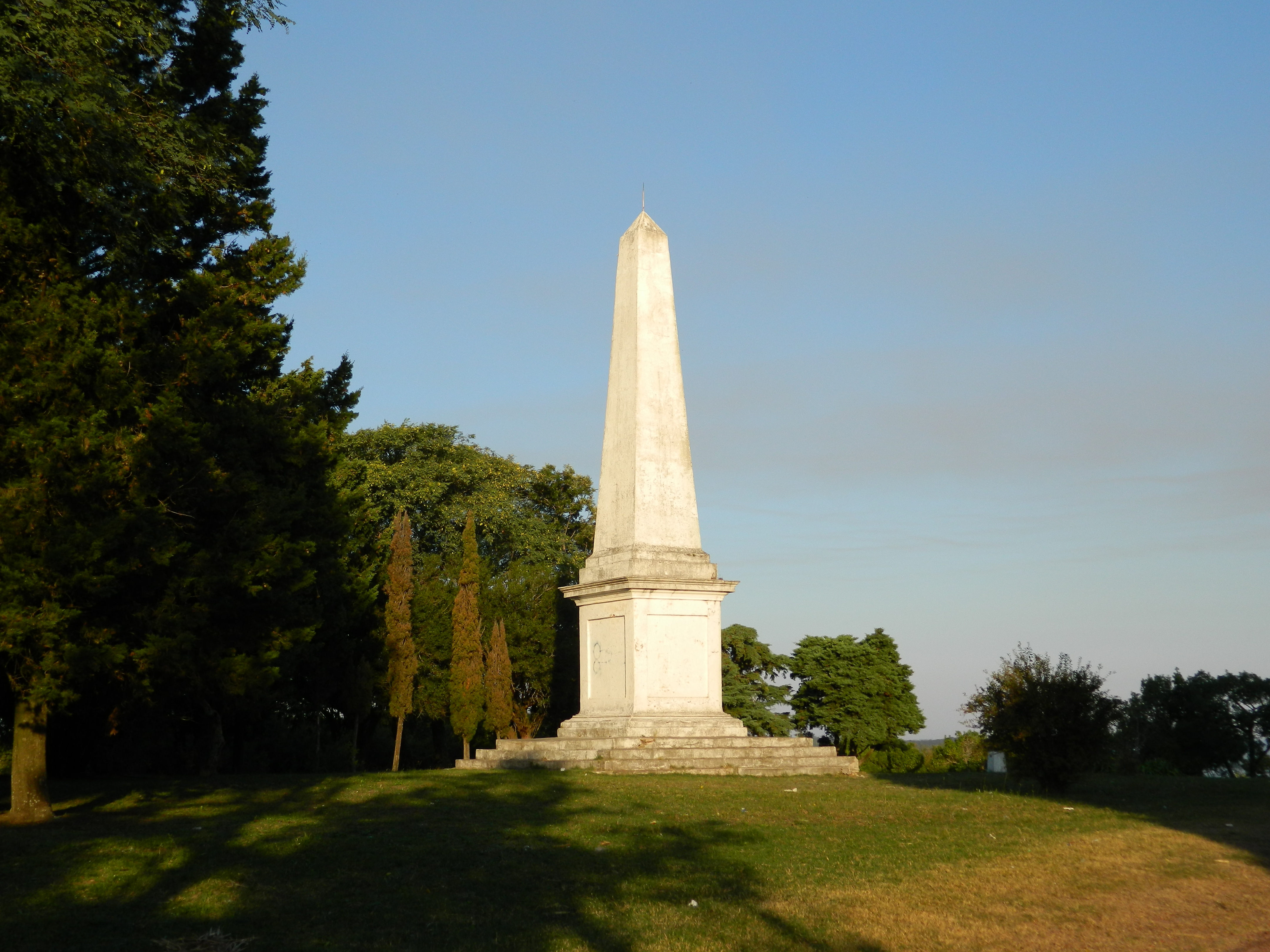 33.915995,-58.414339 coordenadas "Pirámide de Solís", que recuerda a los grandes navegantes de estos ríos y en especial a Juan Díaz de Solís, que desembarcó en esta zona y fue muerto por los nativos del lugar.